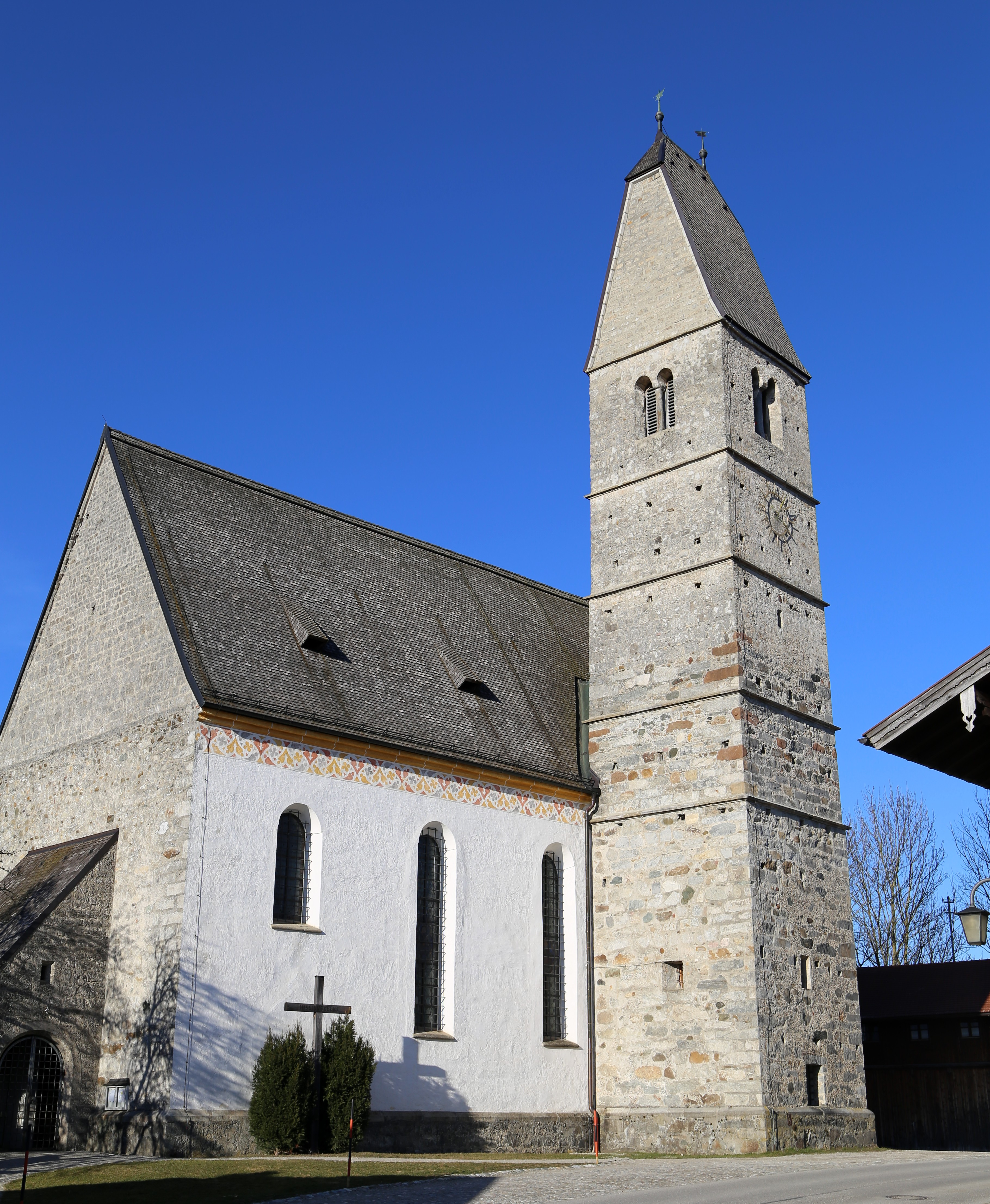 Hirnsberg 33; Kath. Kuratiekirche Mariä Himmelfahrt, Saalbau aus teils unverputztem Bruchsteinmauerwerk mit Satteldach und Südturm mit Schopfwalmdach und Farbsteinchen im Fugenmörtel, spätgotisch, Neubau Ende 15. Jh., Turm älter, 1496 Weihe, 1693 Dachstuhl, 1717 Turmobergeschoss, 1743 durch Wolf Ganterer Umgestaltung des Inneren; mit Ausstattung.